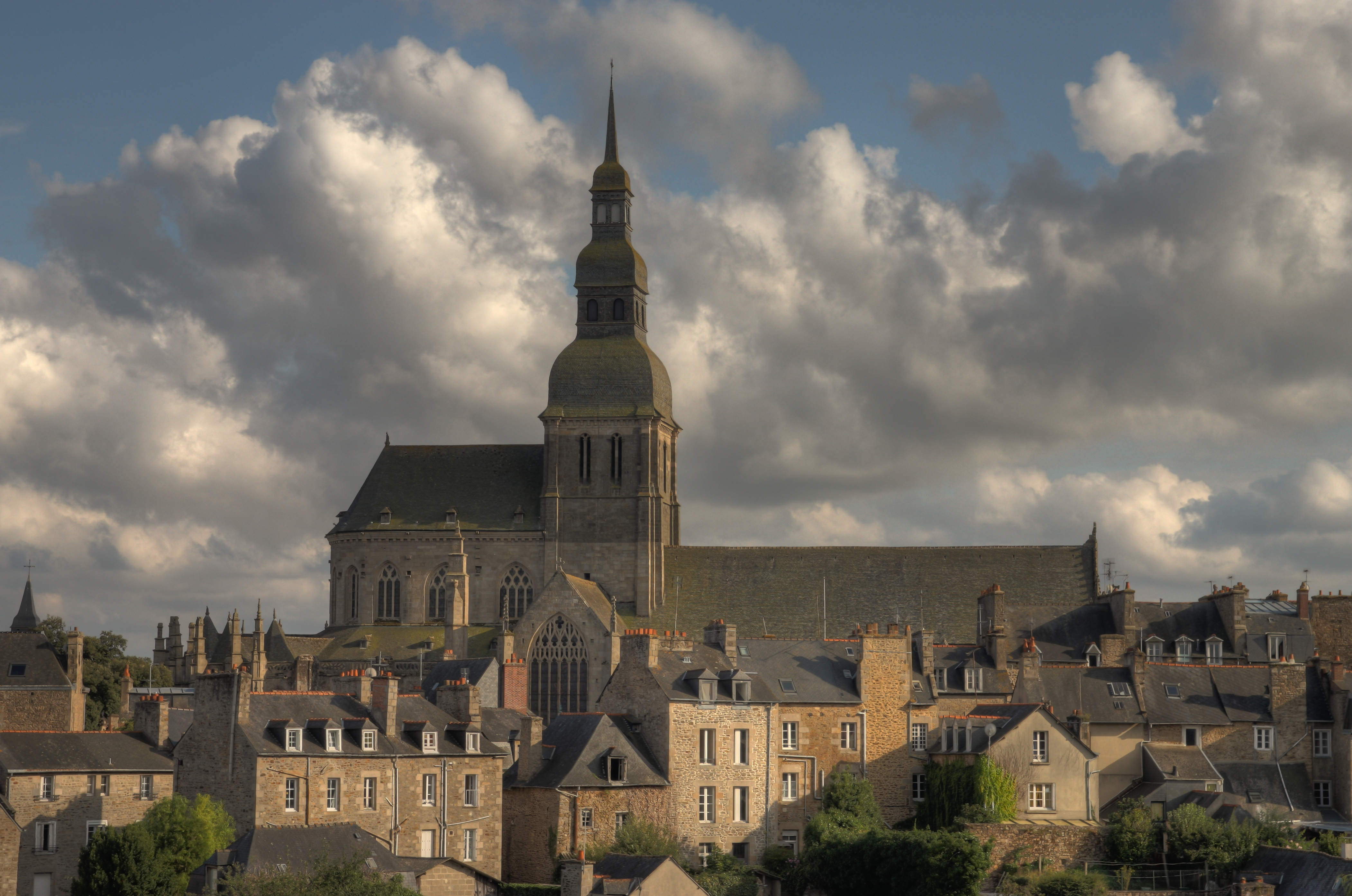 Dinan - Saint-Sauveur vue des remparts